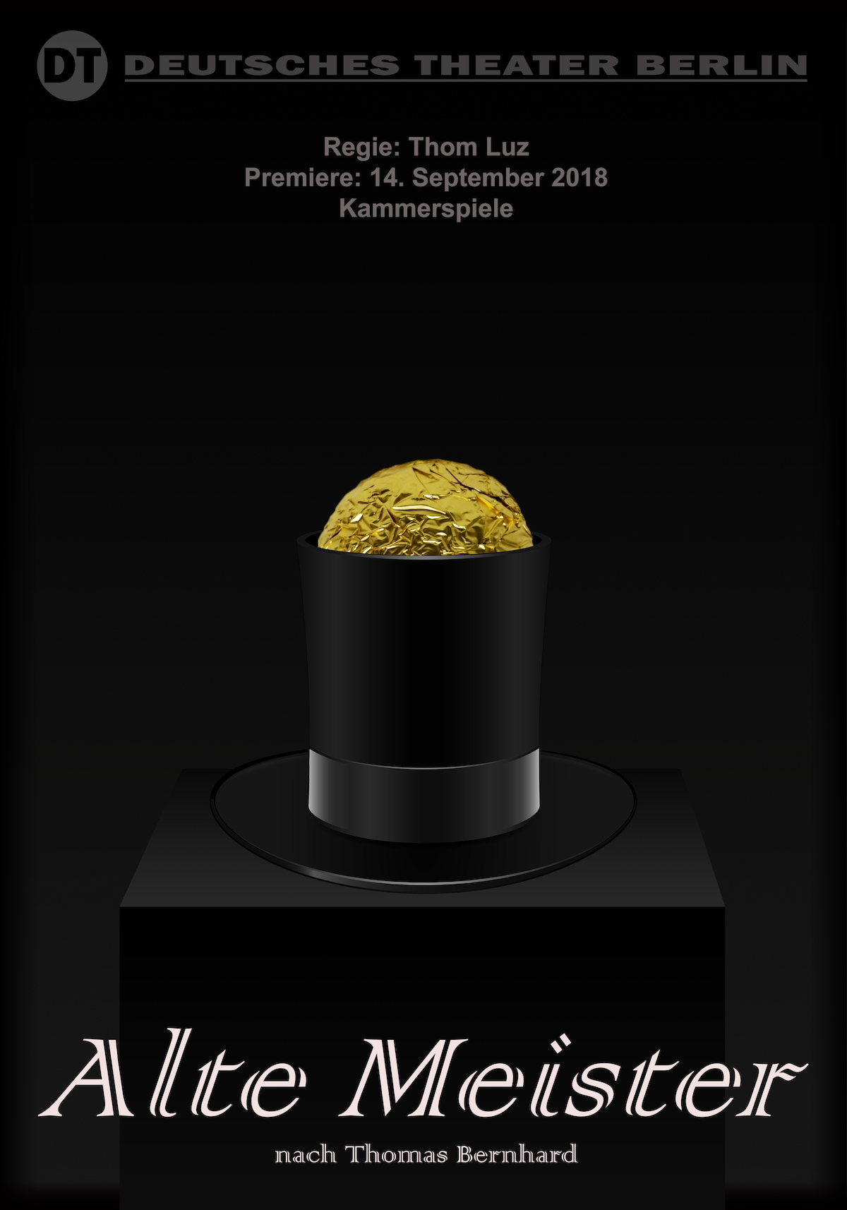 ТЕАТРАЛЬНЫЙ ПЛАКАТ. Комп.графика, 70х100 см. 2018 г.jpg